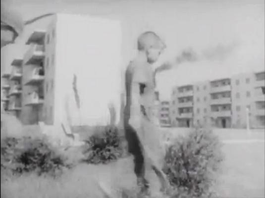 Niños jugando en el Barrio Grafa, inaugurado en 1950 por el Presidente Perón. Buenos Aires, Argentina.